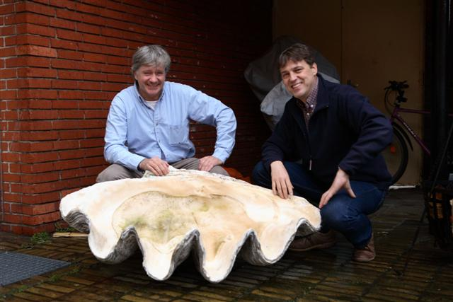 Doopvontschelp grootste ter wereld